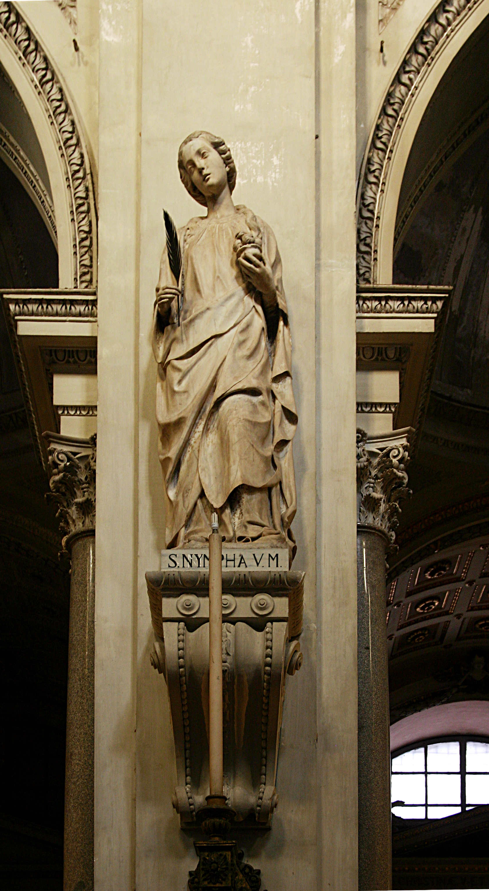 Cathedral of Palermo